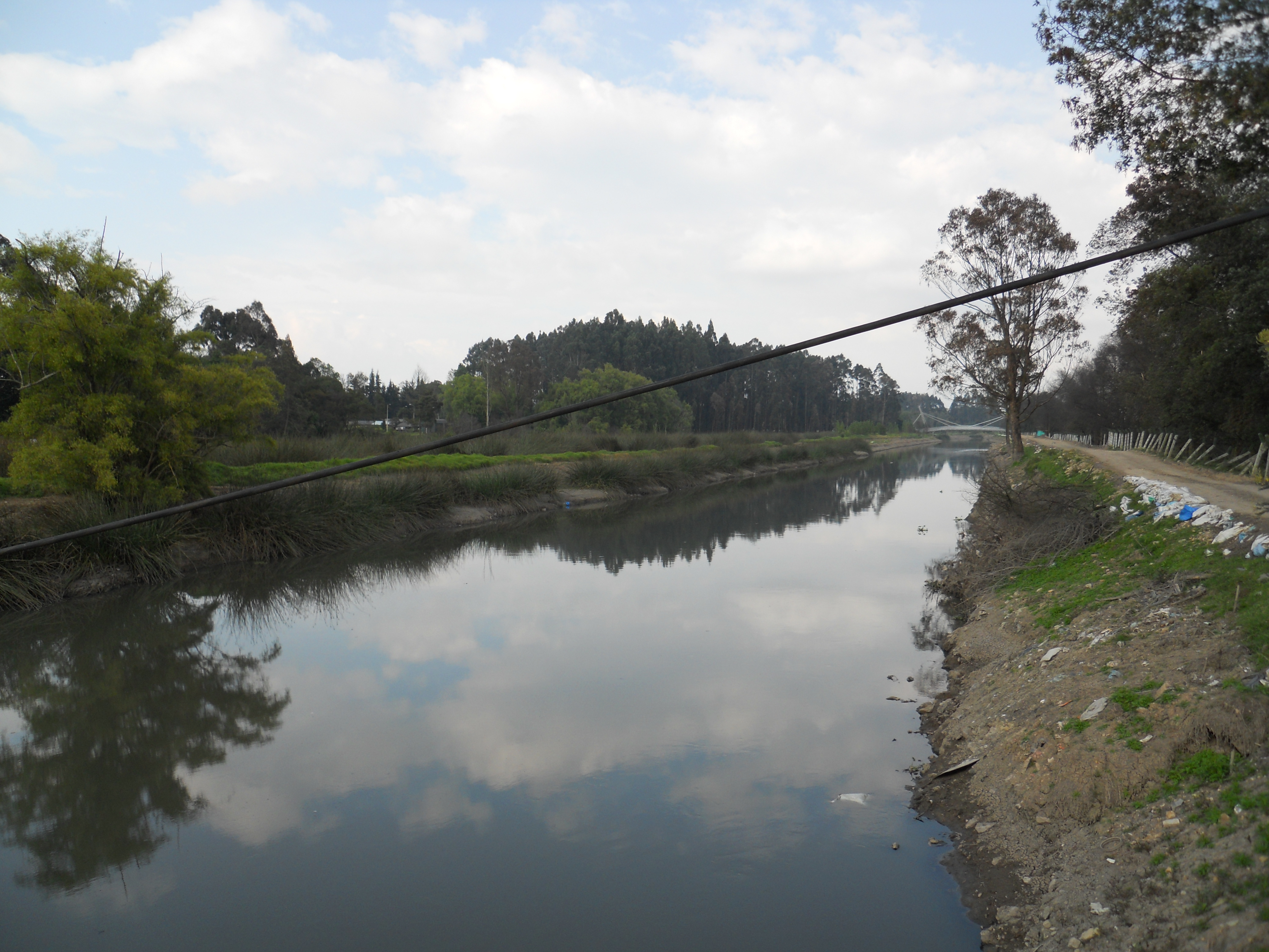 El río Bogotá a su paso por la localidad bogotana de Engativá.